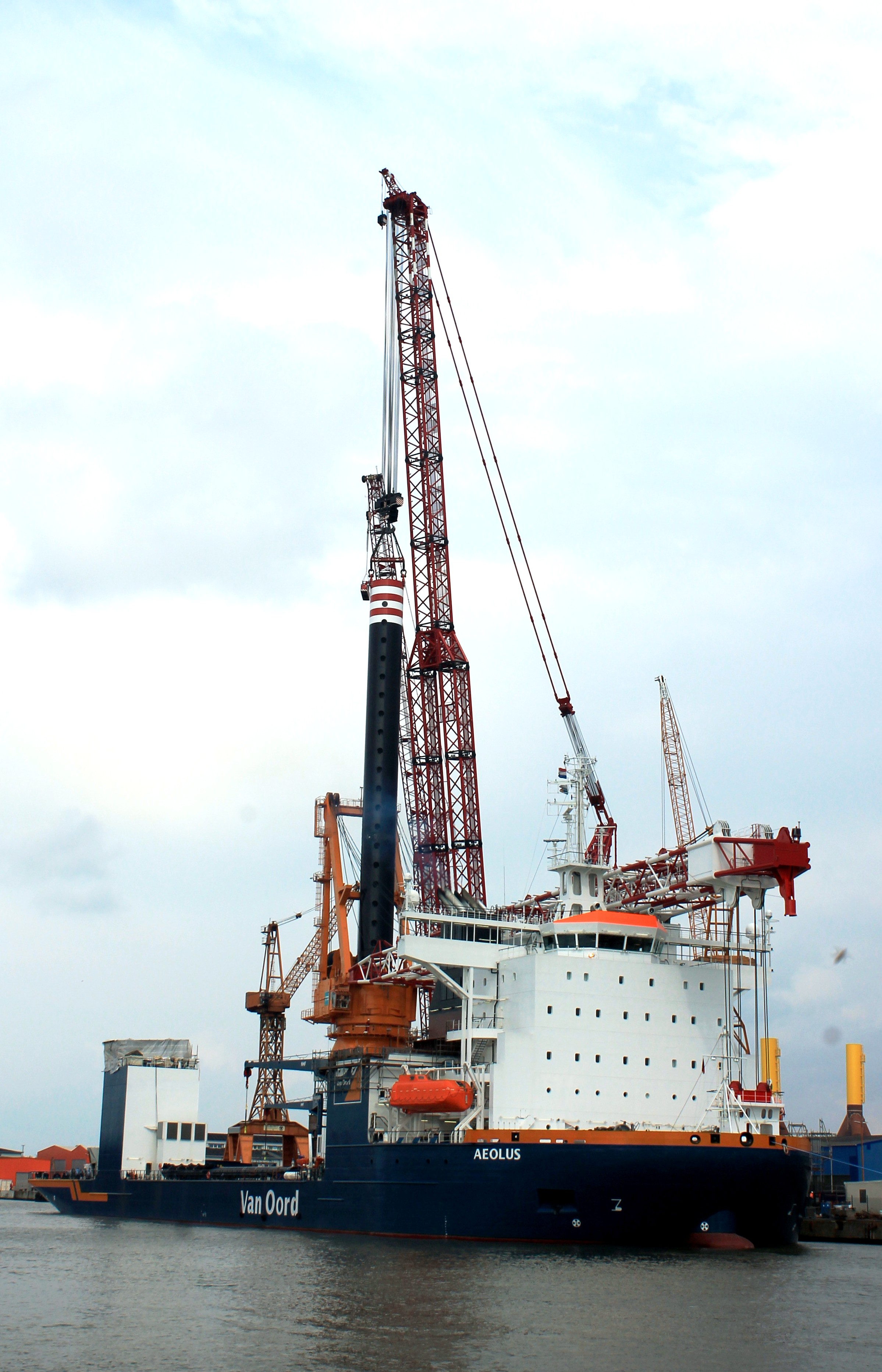 Lloyd Werft, Einsetzen von Hubbein 1 des Errichterschiffes Aeolus